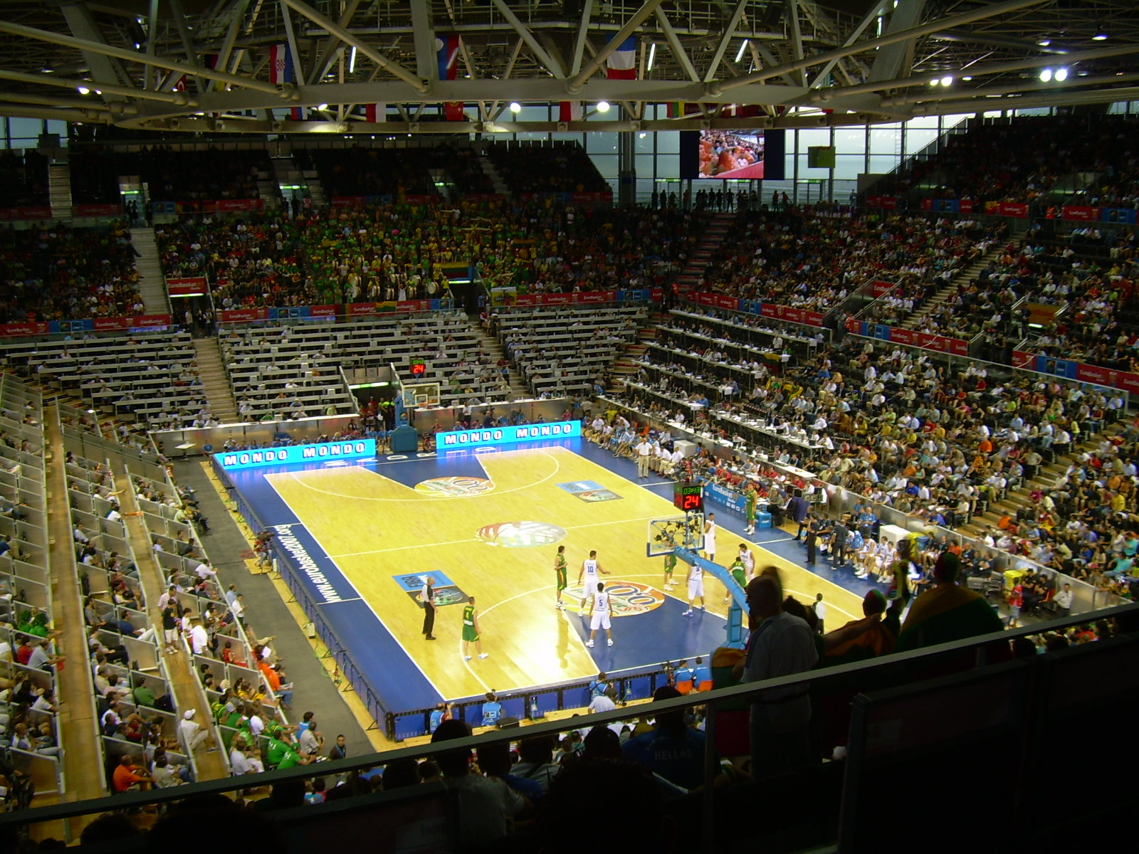 Partido del eurobasket07 entre Lituania e Italia